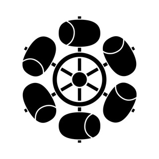 六つ水車